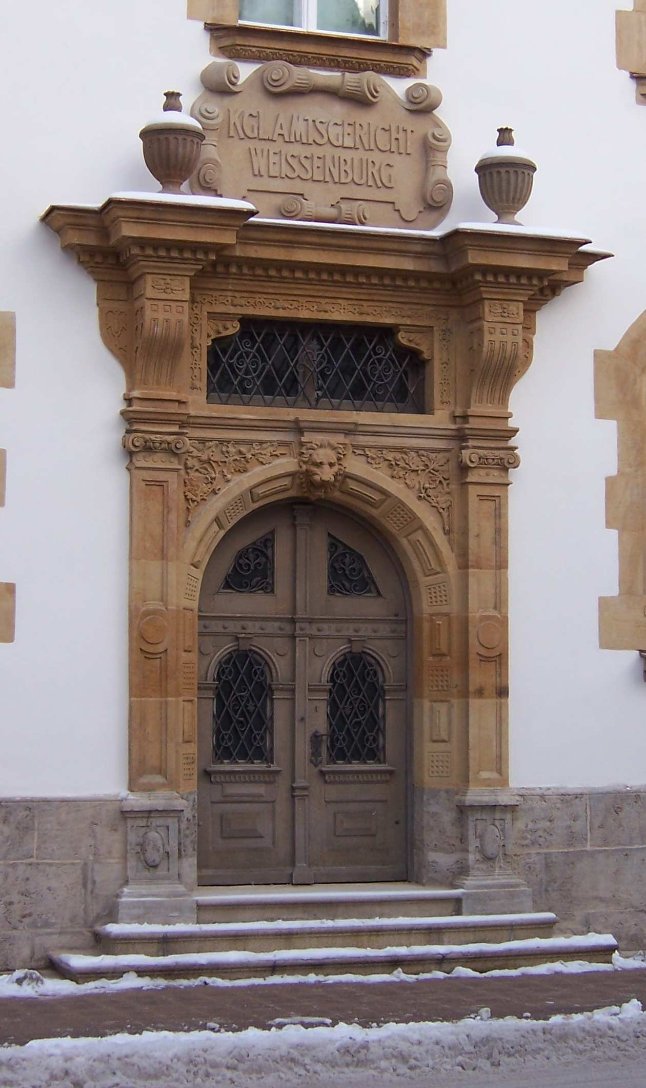 Weißenburg, ehemaliges Amtsgericht